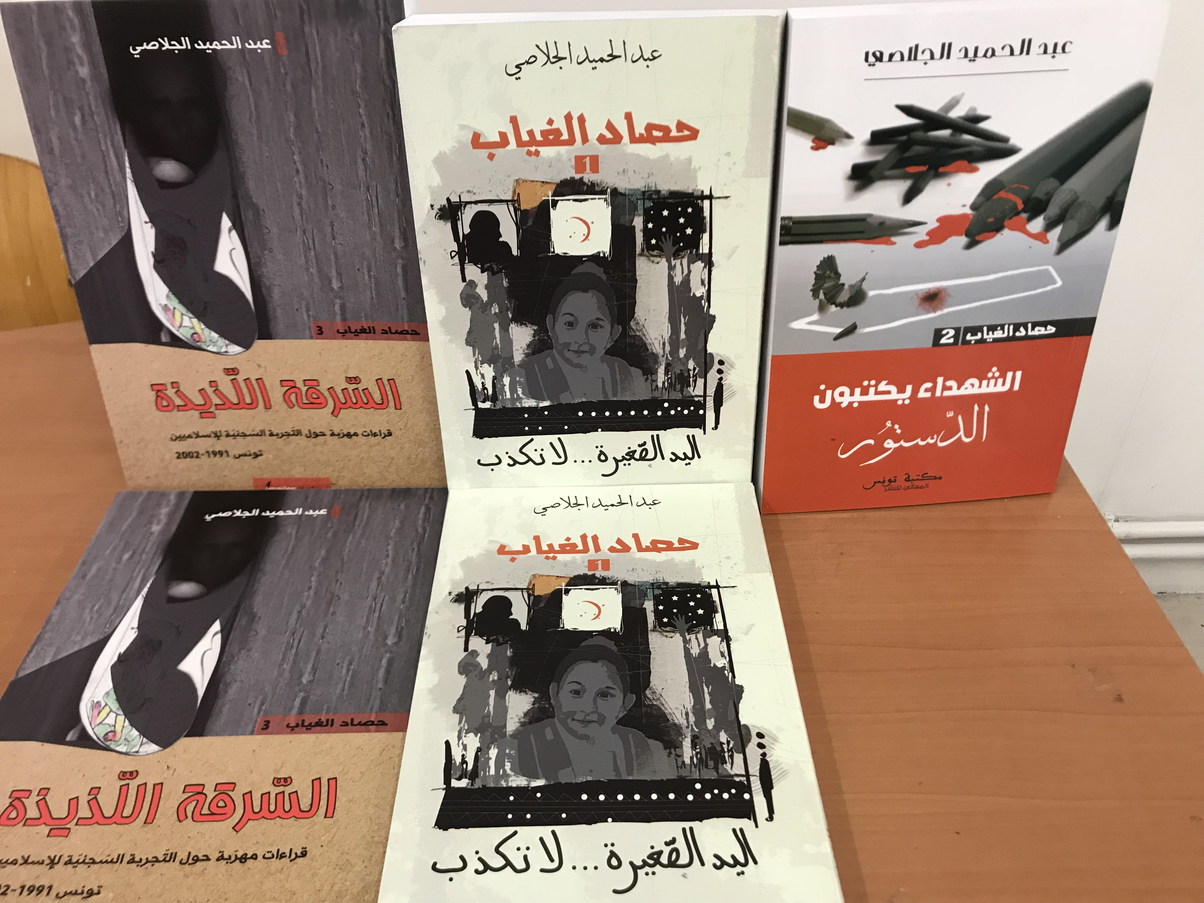 Livres de Abdelhamid Jlassi en 2017. Série « Moisson de l’absence »: - "La petite main ne ment pas", 2016. - "Les martyrs rédigent la Constitution", 2017. - "Vol savoureux", 2017.